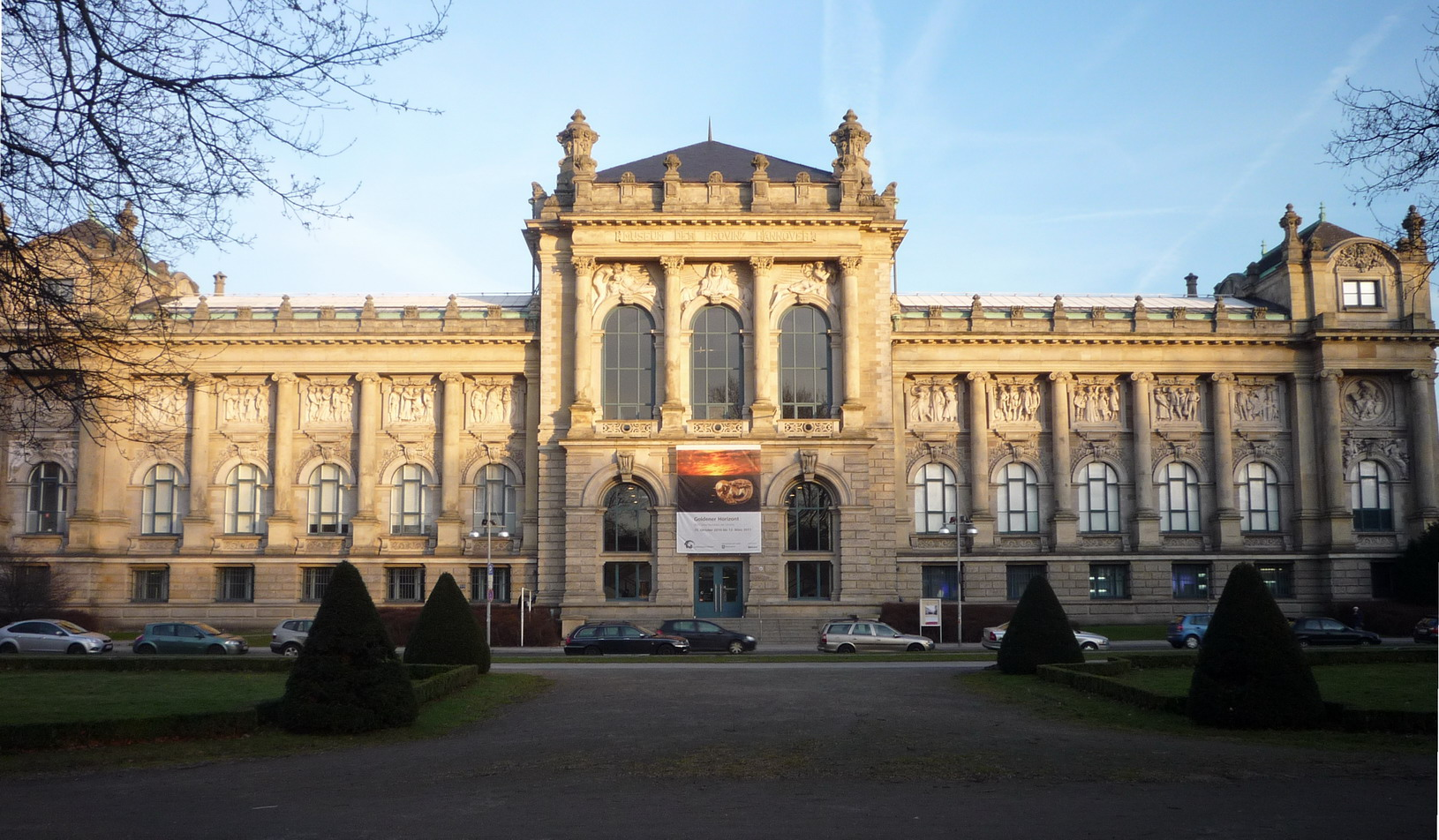 Niedersächsisches Landesmuseum